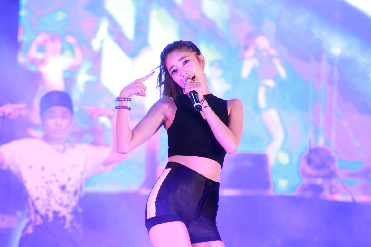 140920 경희사이버대학교.